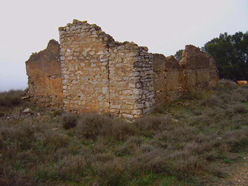 Restos de la ermita de San Gregorio, en Tudela Navarra España